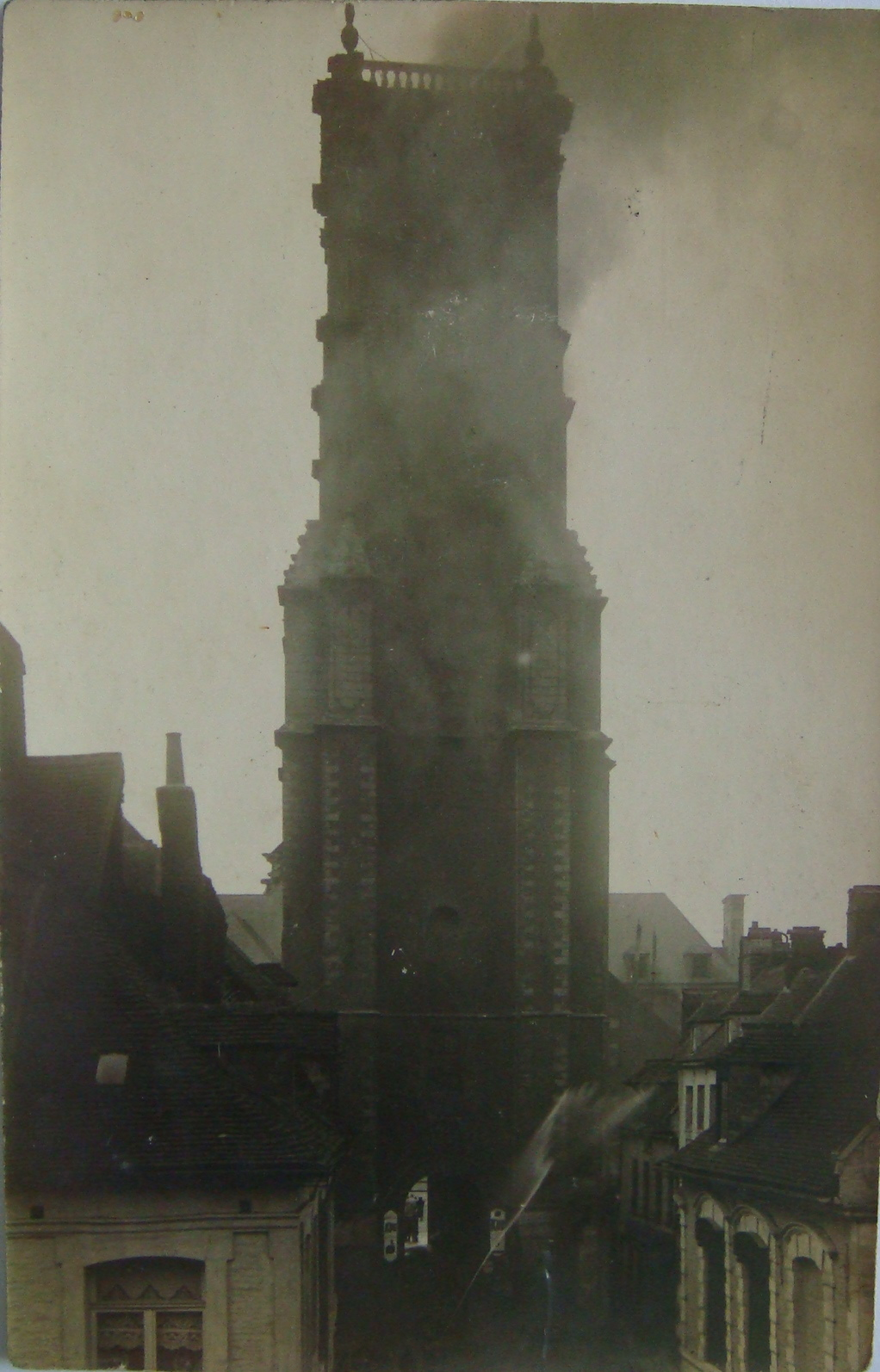 Le beffroi d'aire sur la lys pendant un incendie